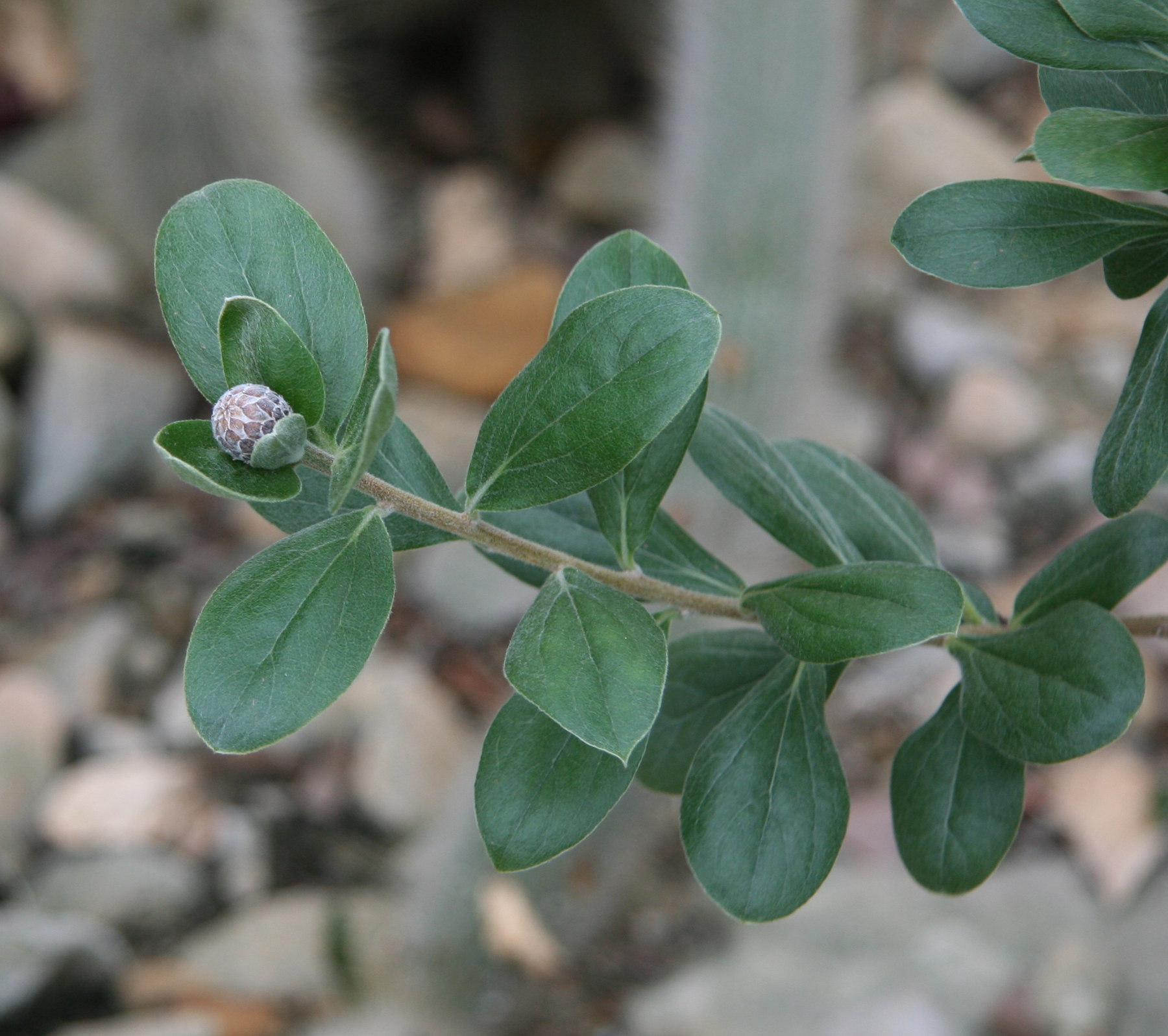 Arnaldoa macbrideana im Botanischen Garten Dresden